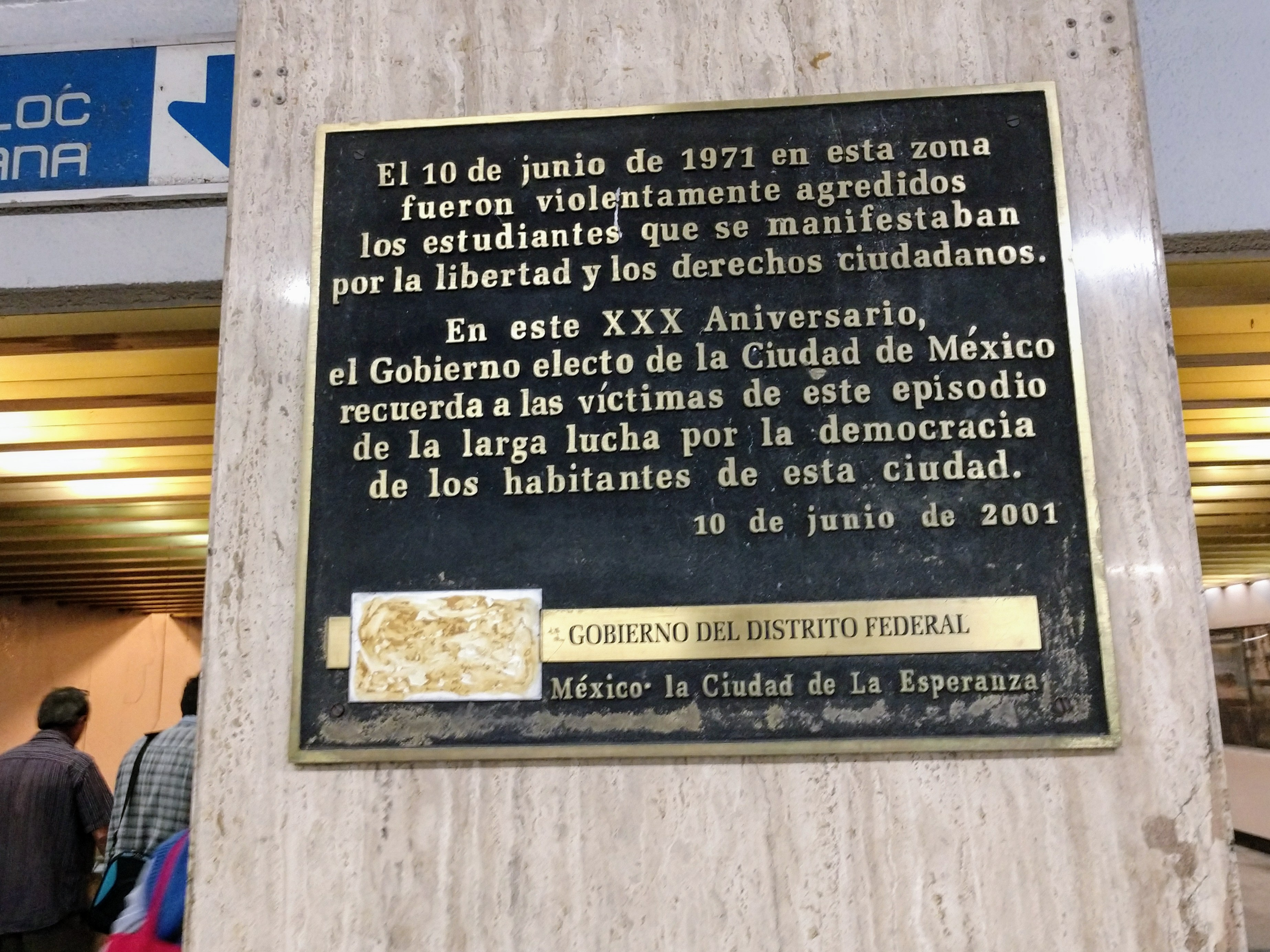 Placa conmemorativa de la Matanza del Jueves de Corpus, Estación Normal del Metro de la Ciudad de México.